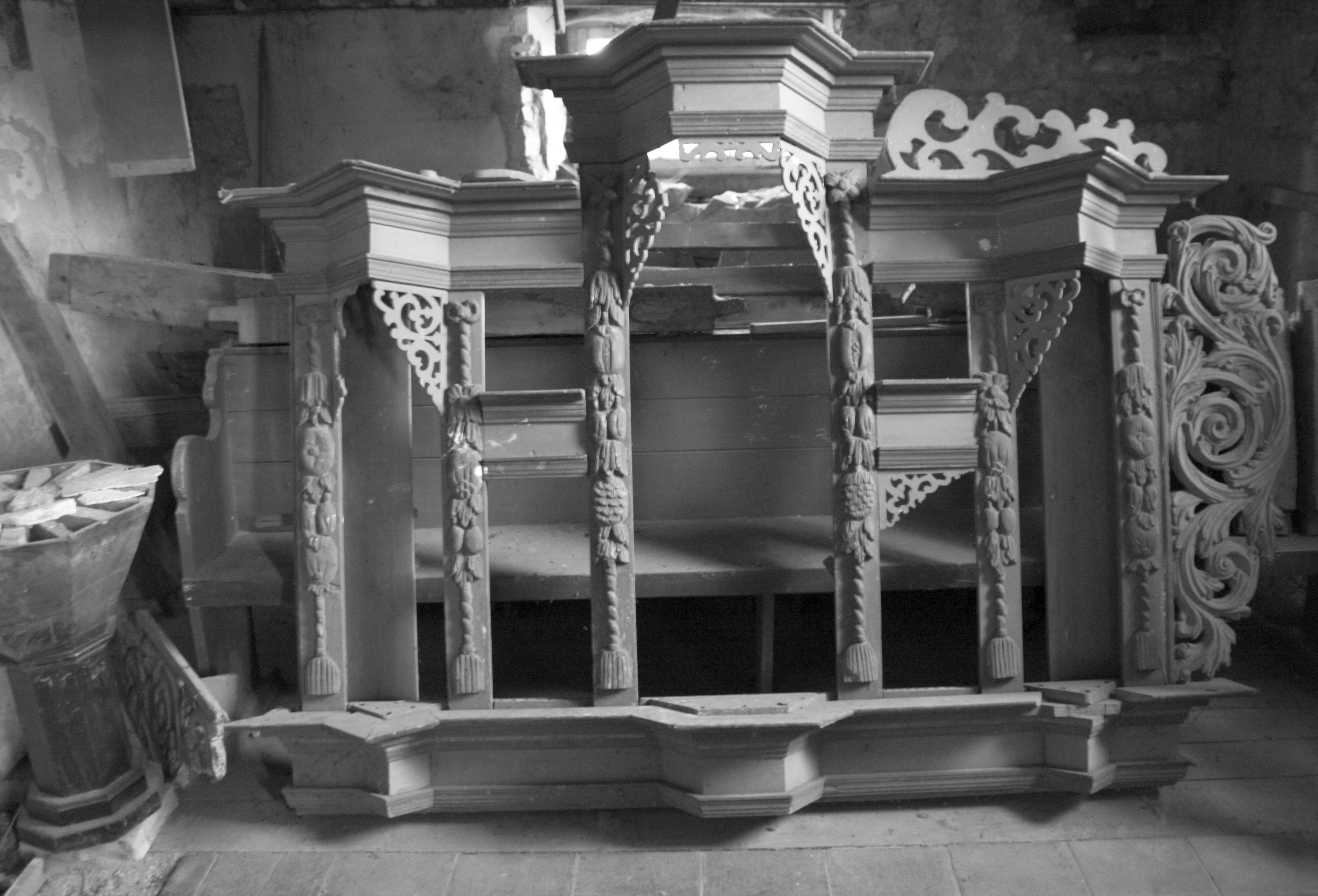 Volpertshausen Alte Kirche